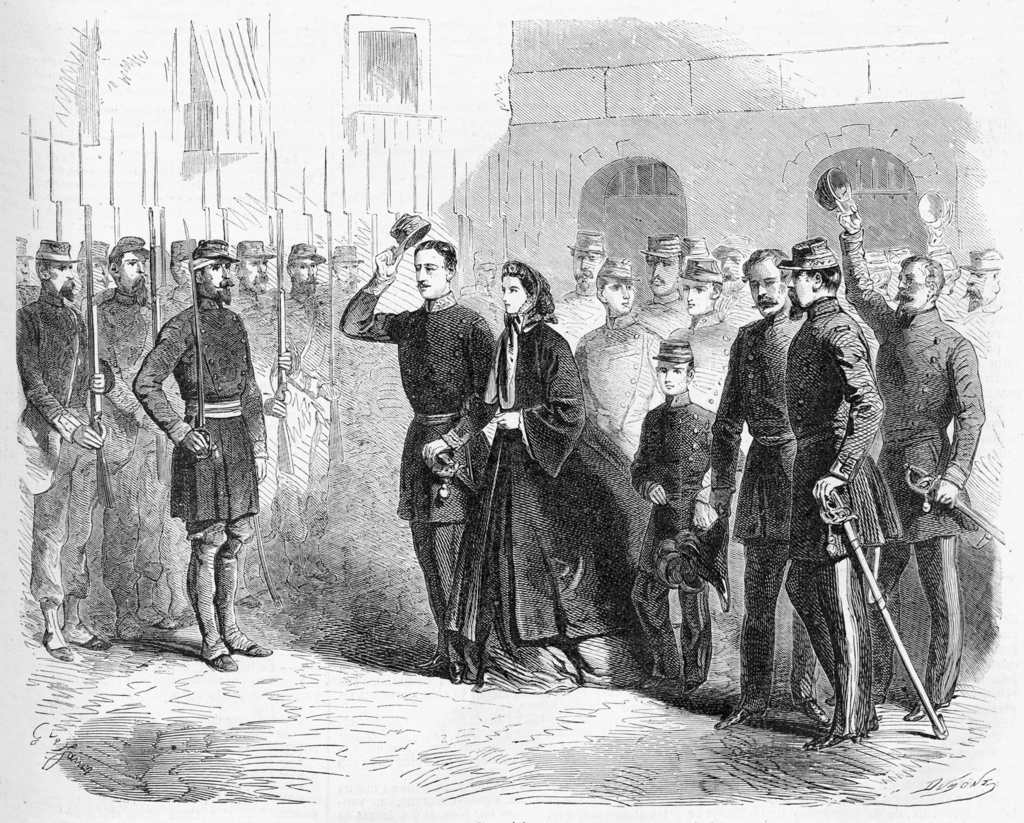 Franceso II di Borbone saluta la guarnigione di Gaeta